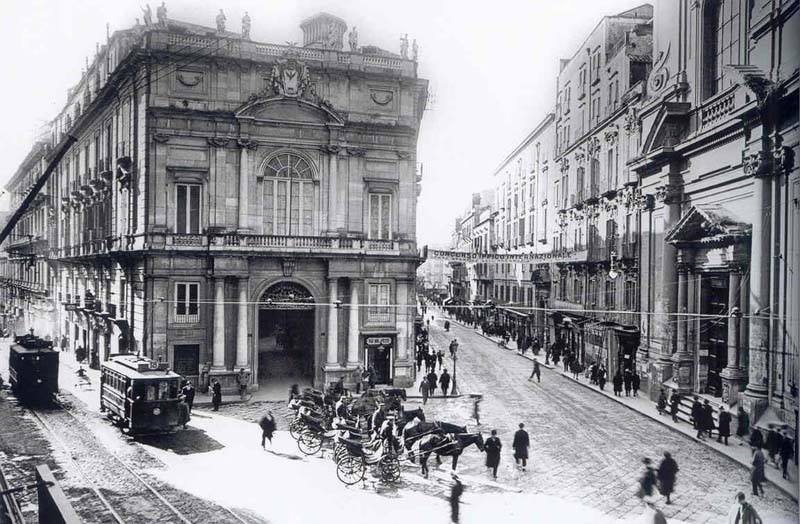 Napoli, via Toledo - Palazzo Doria d'Angri e chiesa dello Spirito Santo. Autore sconosciuto.